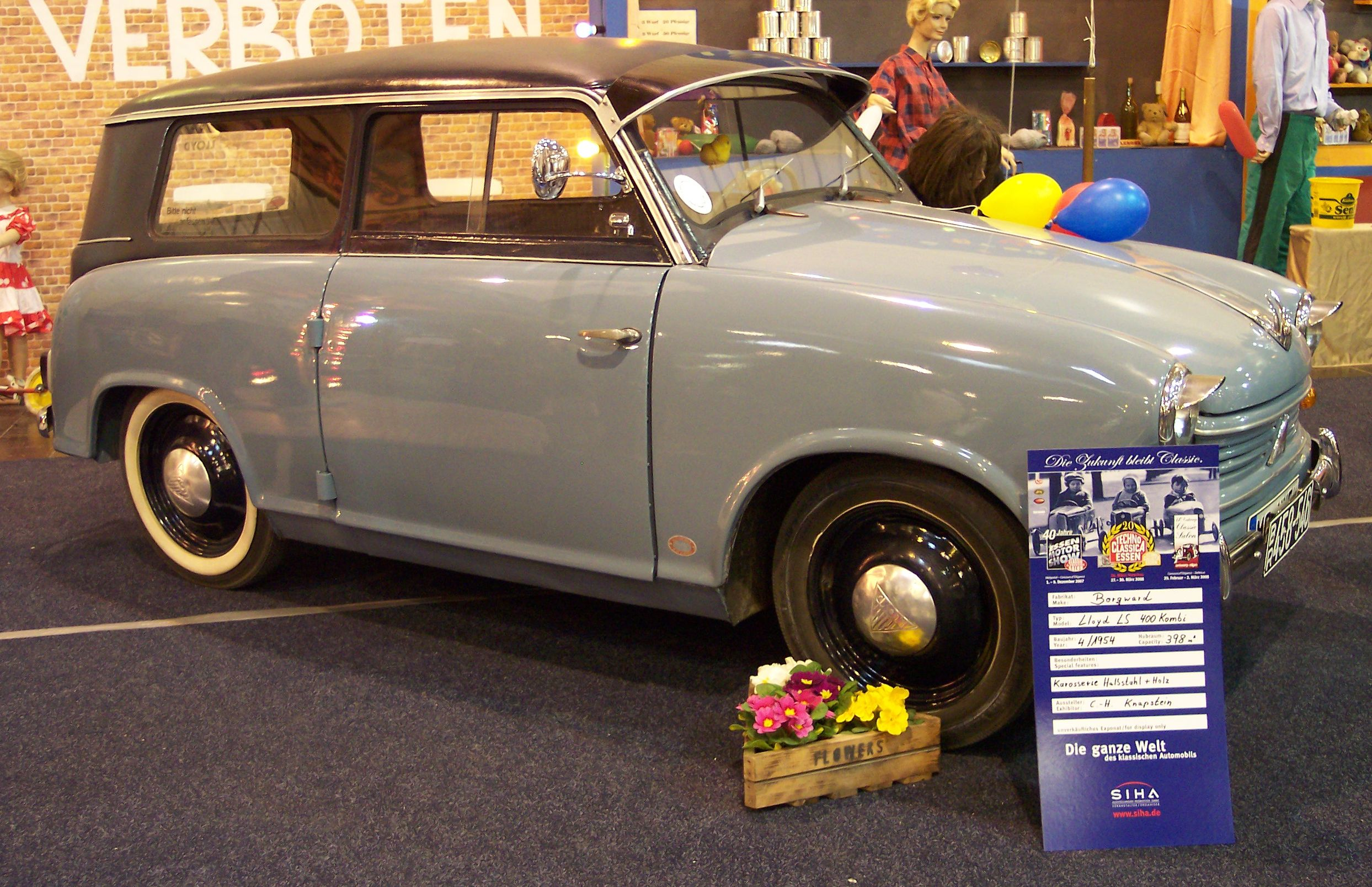 Borgward Lloyd LS 400 Kombi 1954